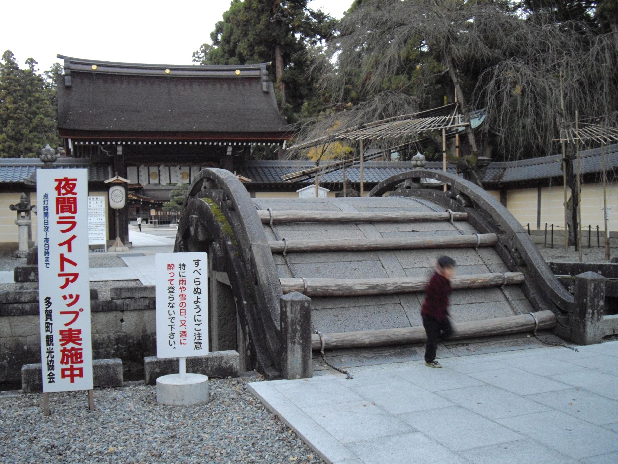 多賀大社